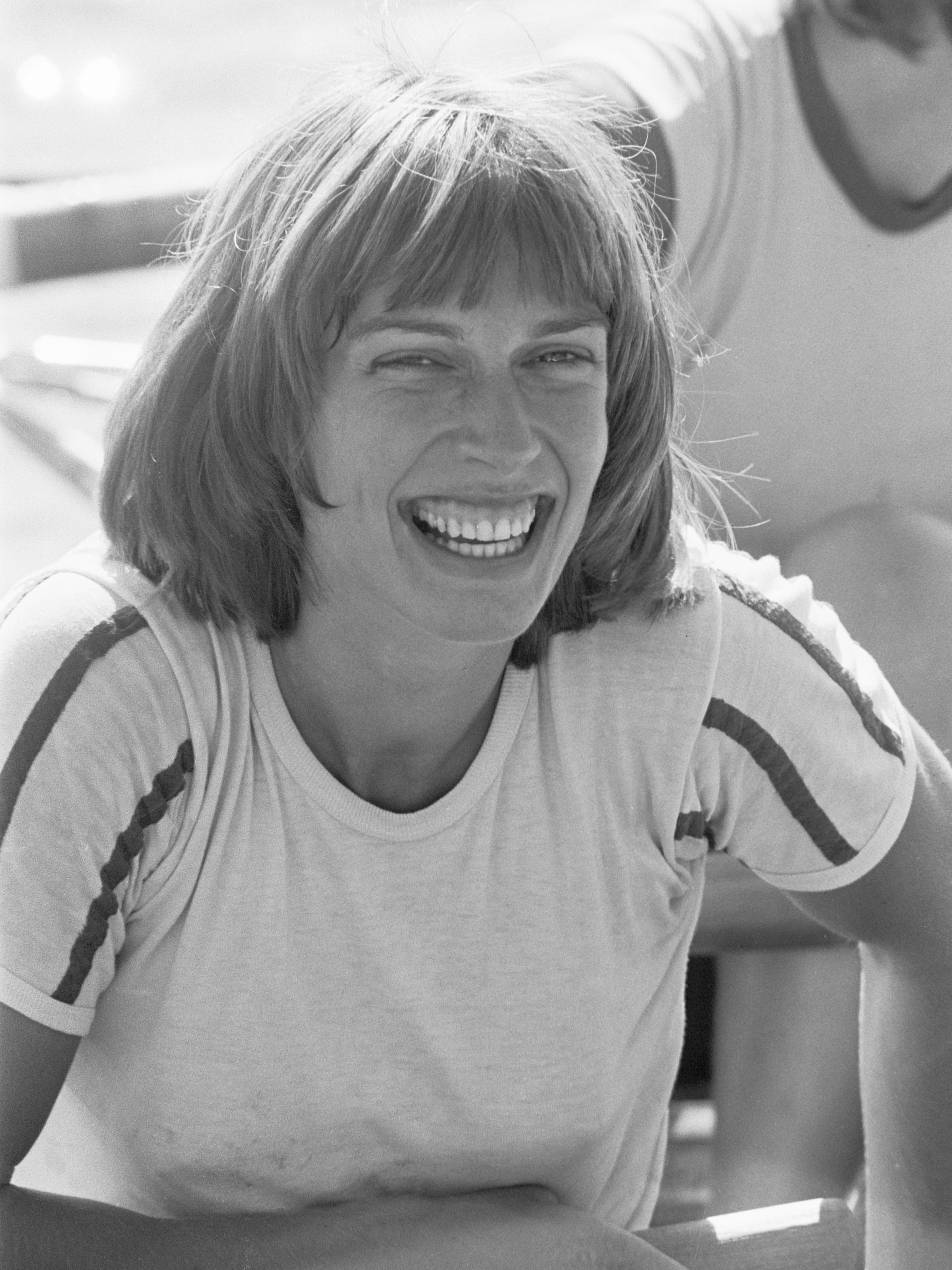 Nationale roeikampioenschappen op de Bosbaan 1975, derde dag; Liesbeth Vosmaer 2 augustus 1975